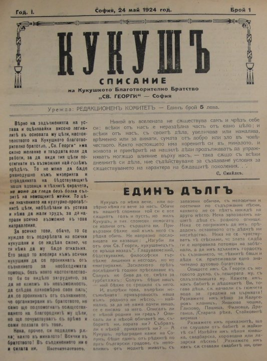 Списание Кукуш на Кукушкото благотворително братство